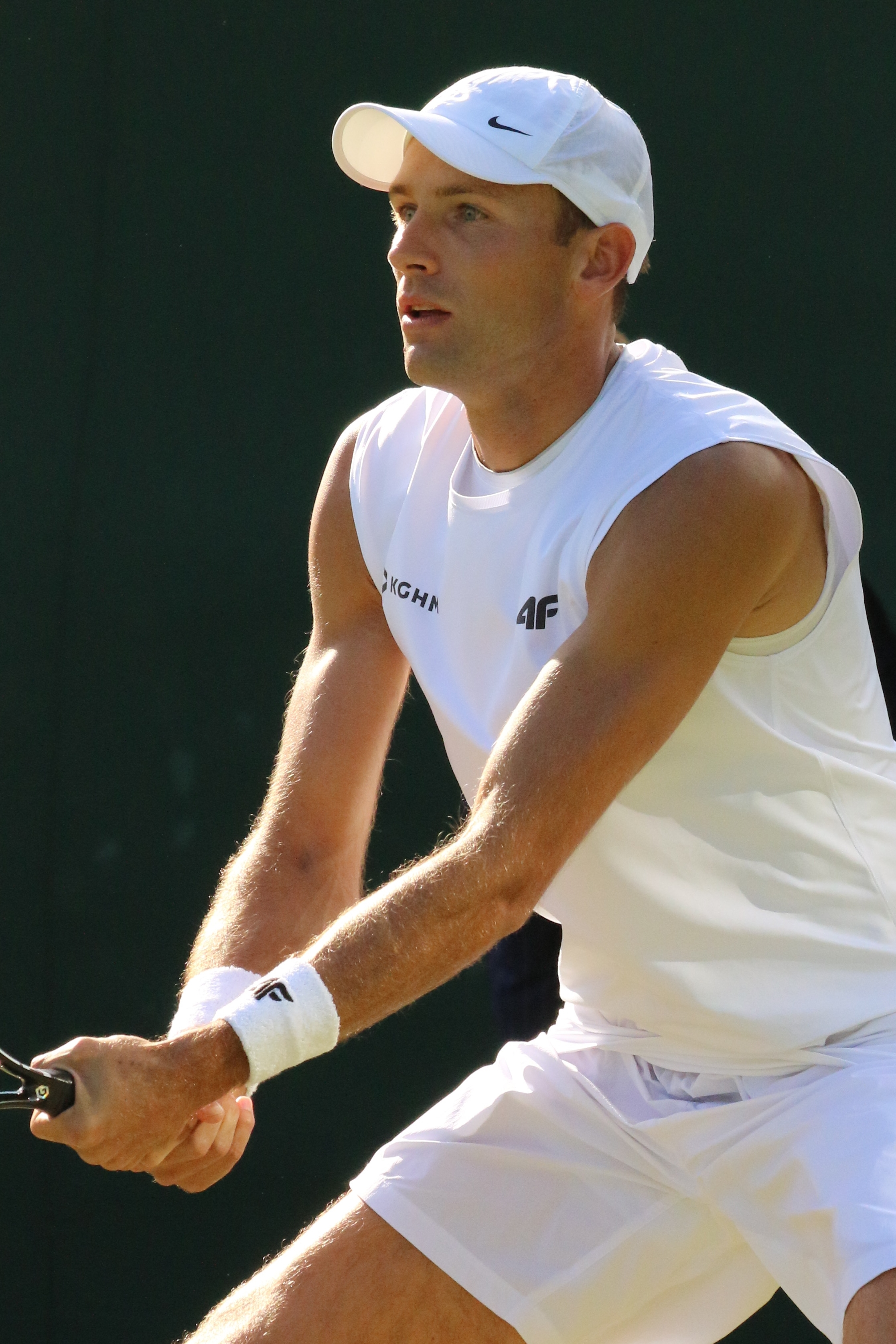 Kubot WM16 (1)